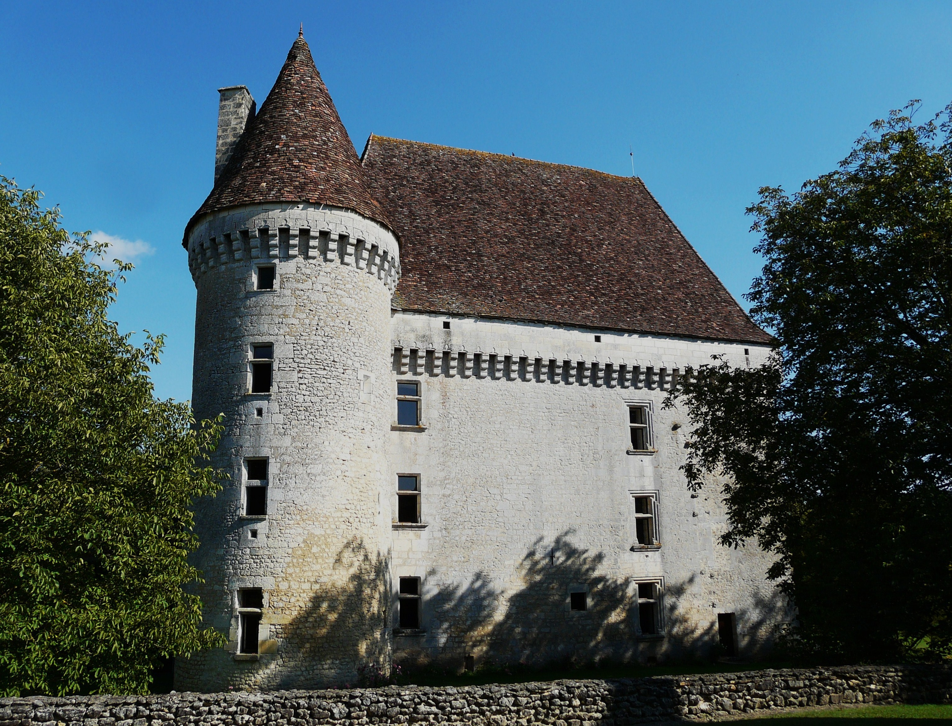 Le château de Saint-Maurice, Saint-Laurent-des-Bâtons, Dordogne, France Object location44° 57′ 25.1″ N, 0° 41′ 24.8″ E .